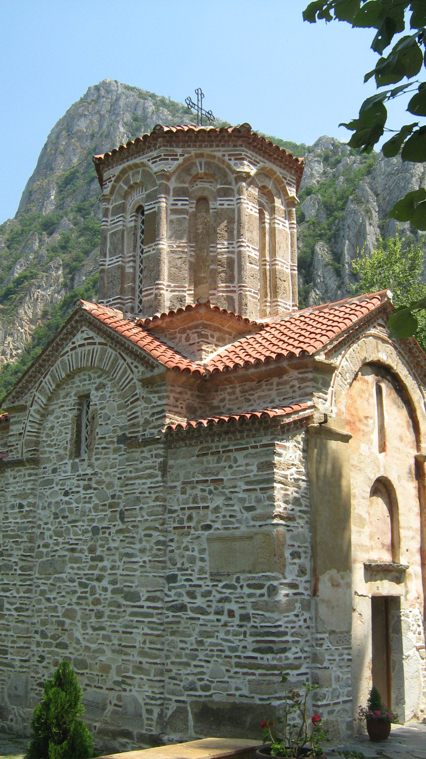 Црква Св. Богородица во кањонот на реката Треска, веднаш после браната на езерото Матка Лиценцирање